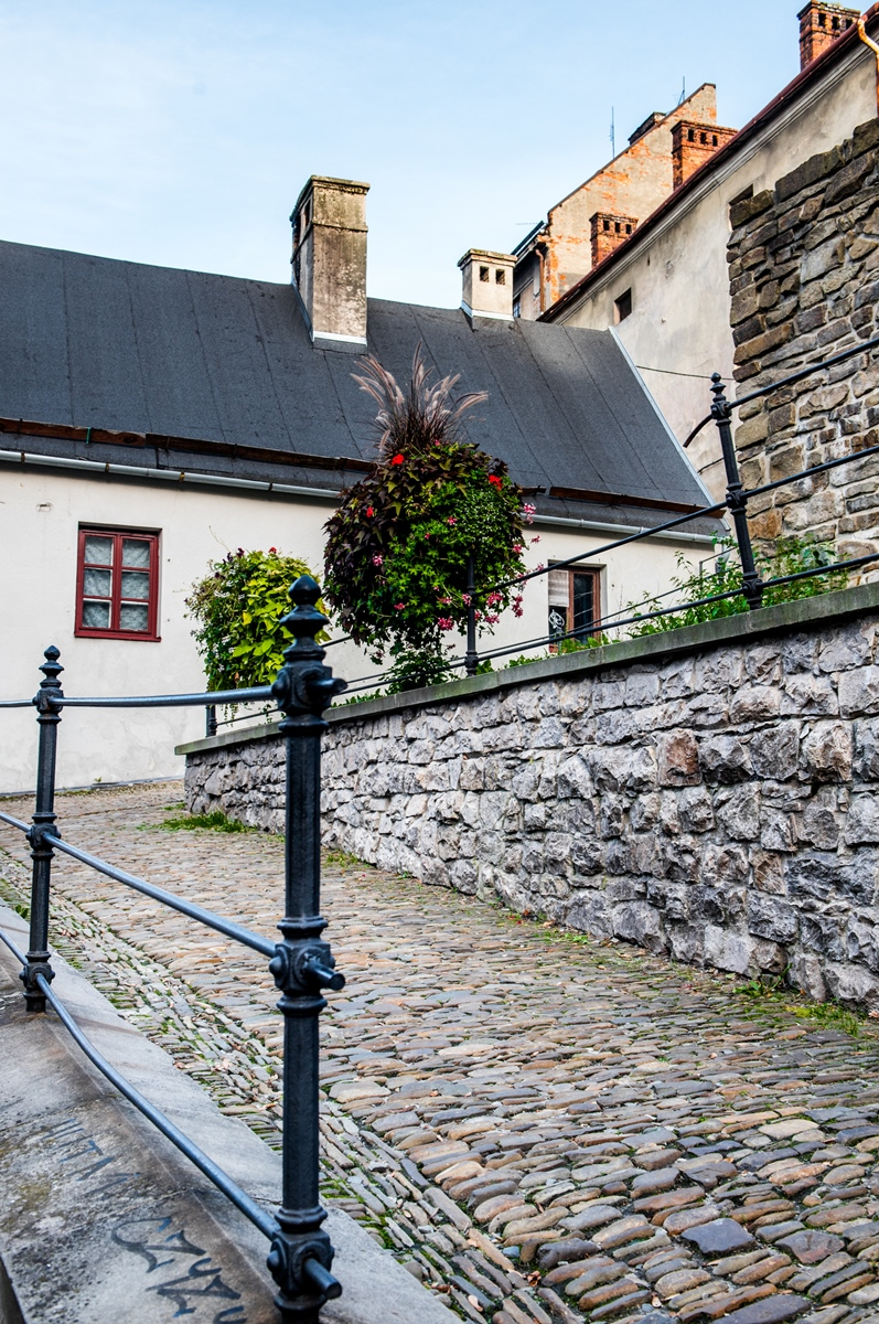 Bielsko-Biała Dawne umocnienia miejskie ul. Kręta